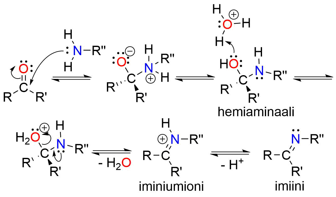 Imiinin muodostumisen mekanismi